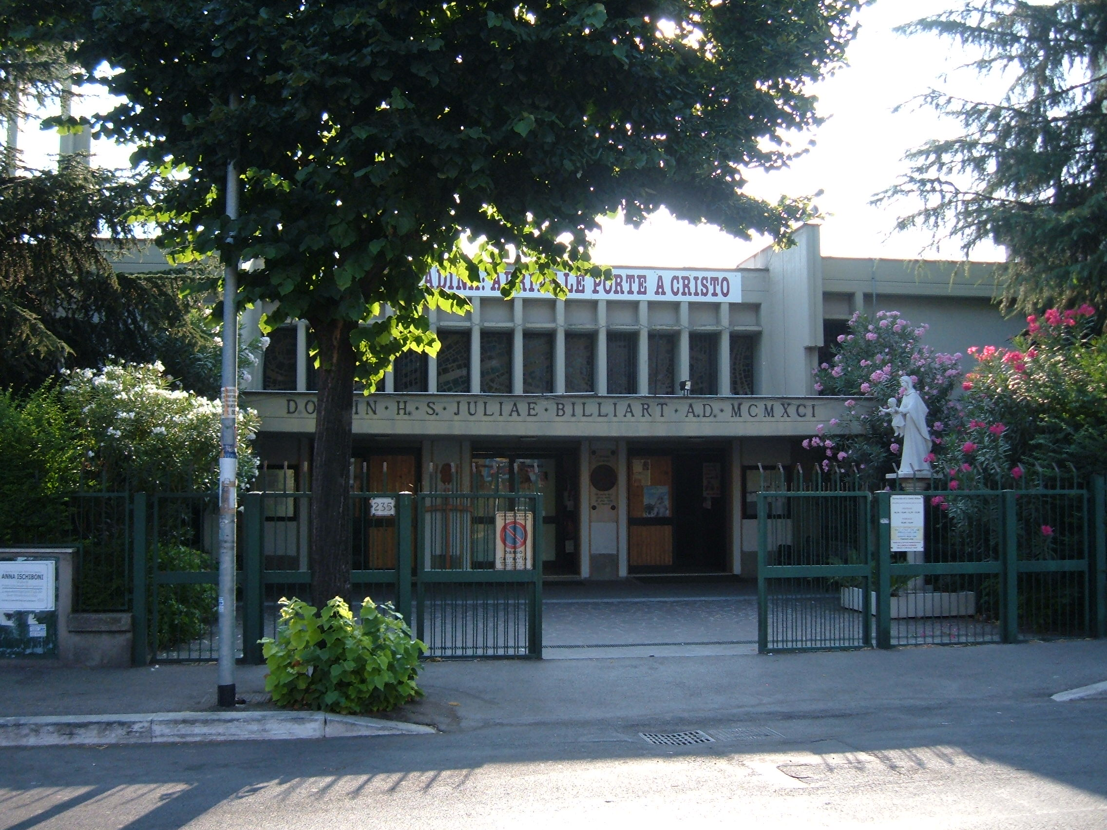 Chiesa di Santa Giulia Billiart, a Roma, nel quartiere Tuscolano. Esterno.